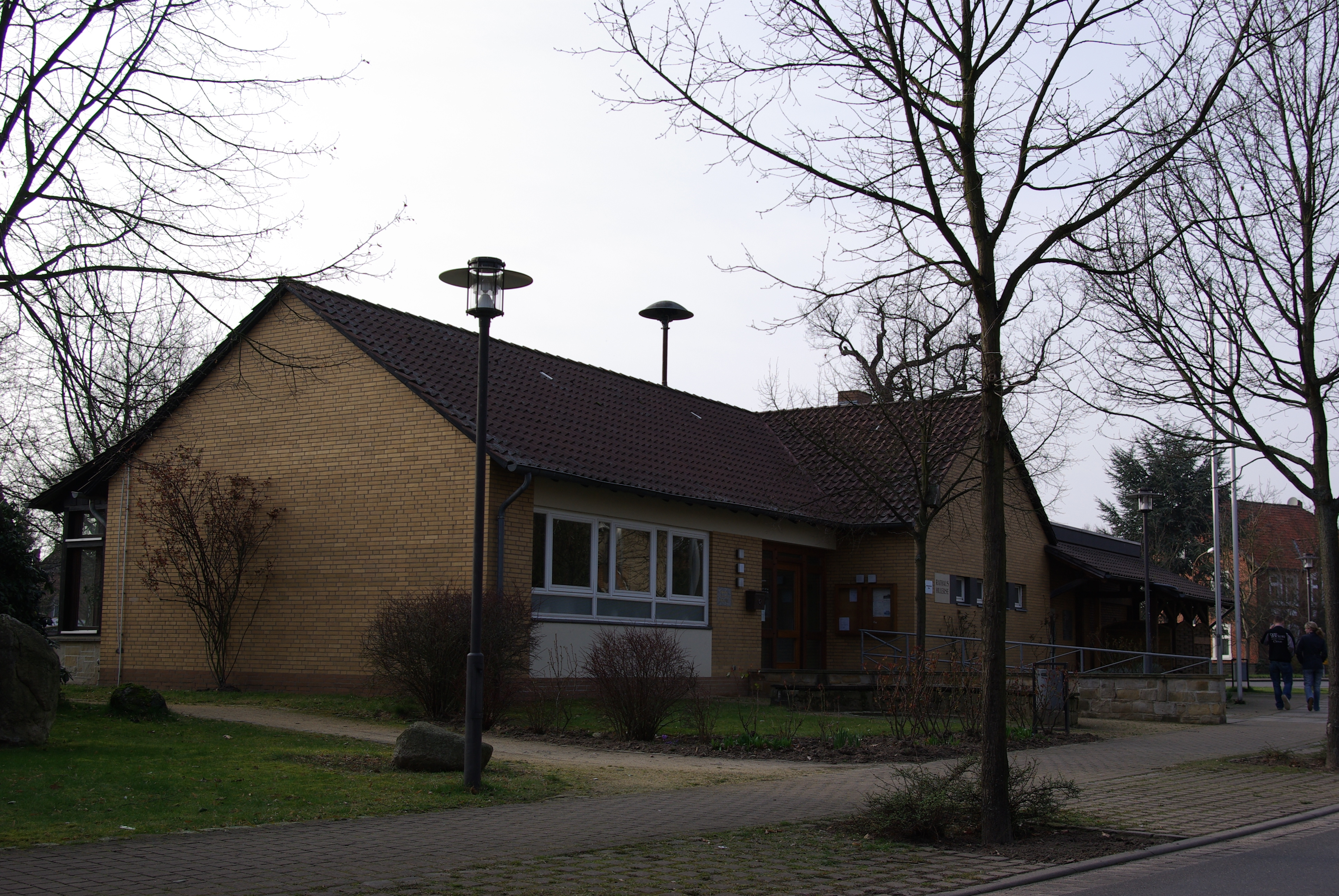 Das Rathaus in Hillerse im Landkreis Gifhorn, Niedersachsen.